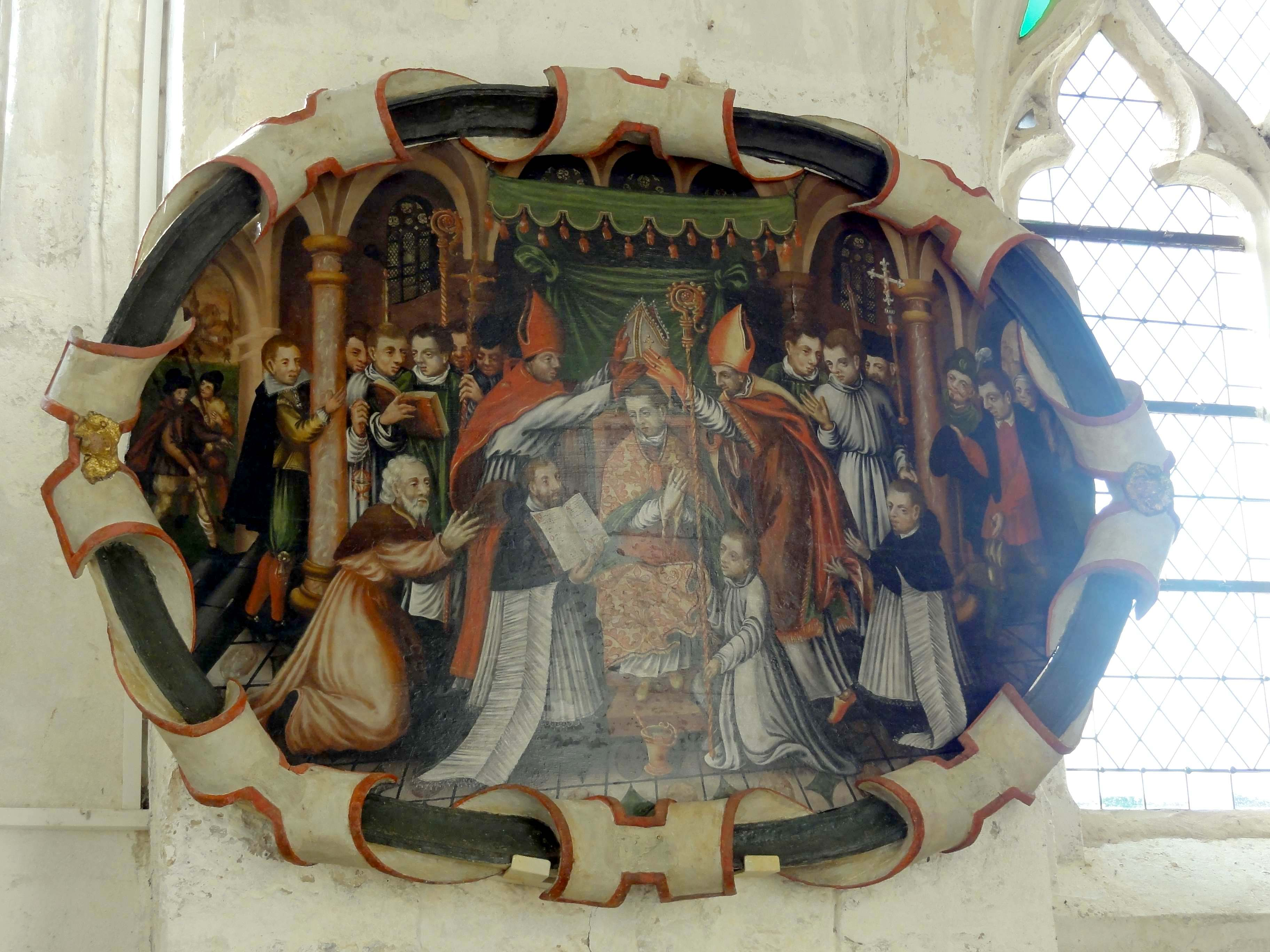 Mobilier de l'église - voir titre.